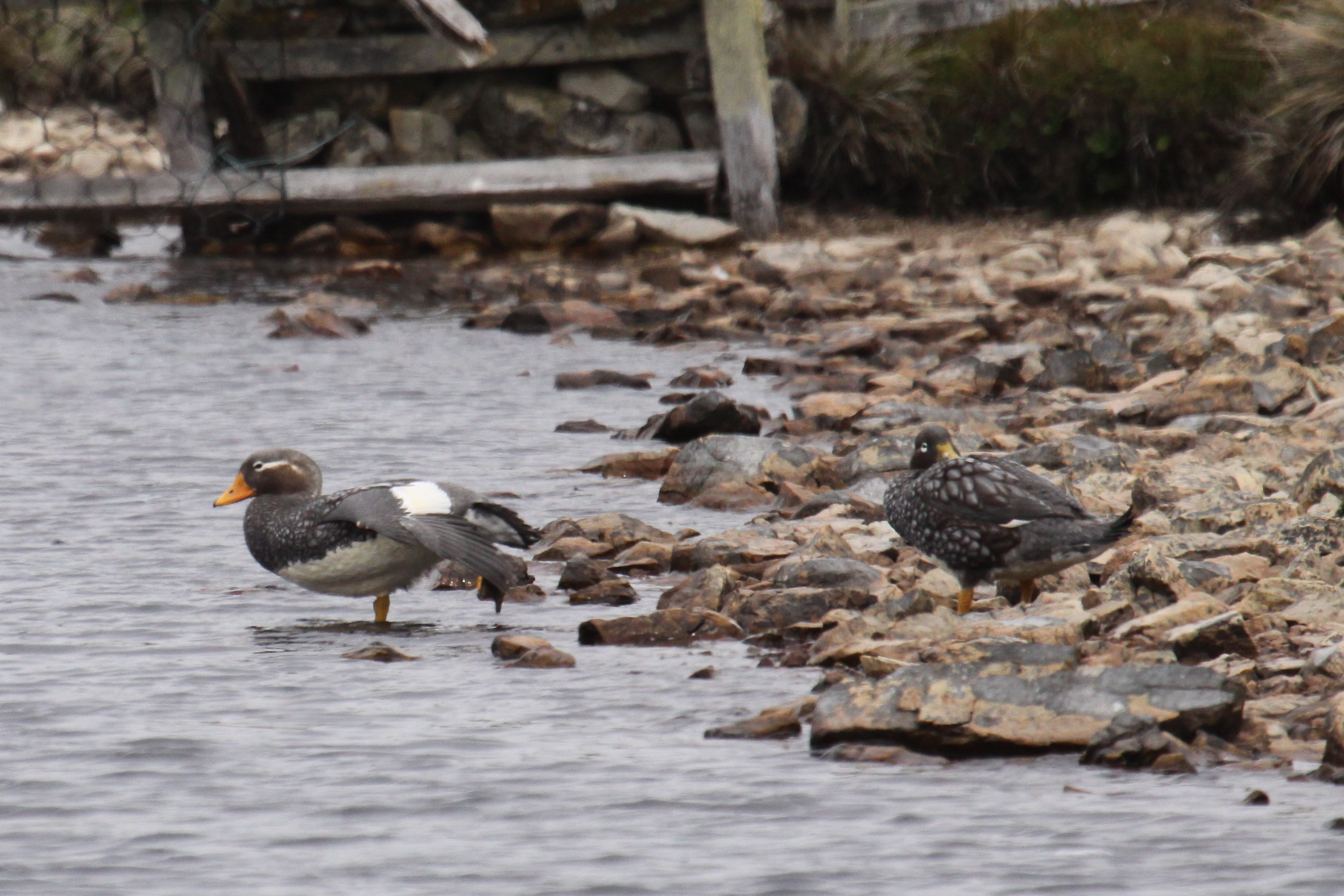 Falkland Islands